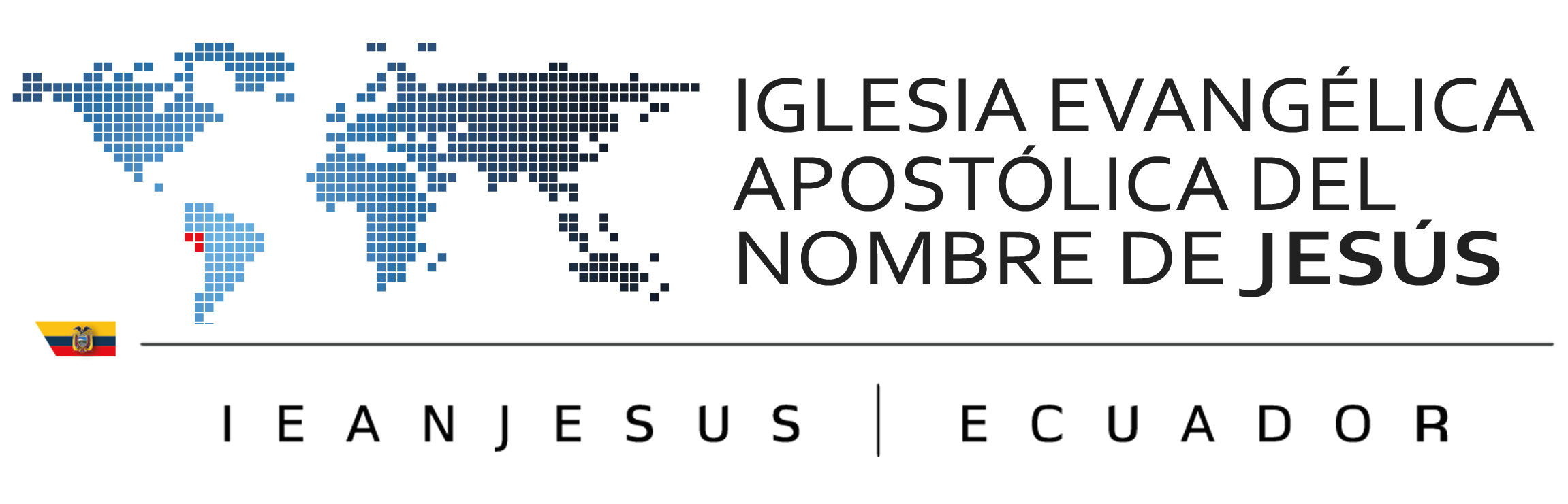 La Iglesia Evangélica Apostólica del Nombre de Jesús, es el grupo religioso evangélico no-católico autónomo más grande del Territorio Ecuatoriano, con congregaciones en más de veinte países alrededor del mundo.